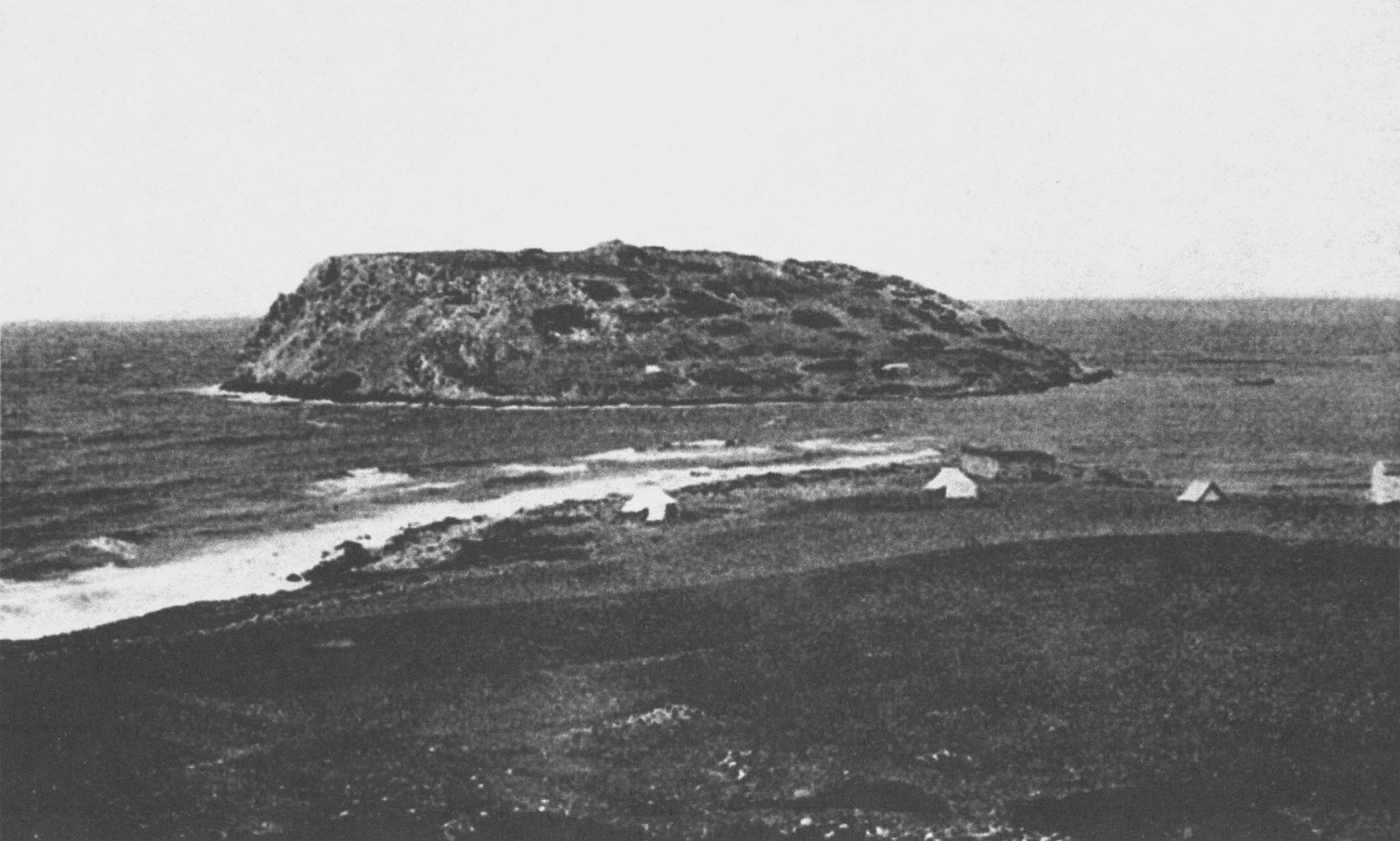 Ausgrabungen in Mochlos im Jahr 1908 durch Richard B. Seager, Kreta, Griechenland